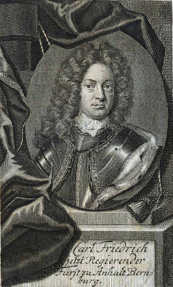 1 grafiskt blad, kopparstick Kopparstick föreställande Karl Fredrik av Anhalt-Bernburg (1668-1721), furste.